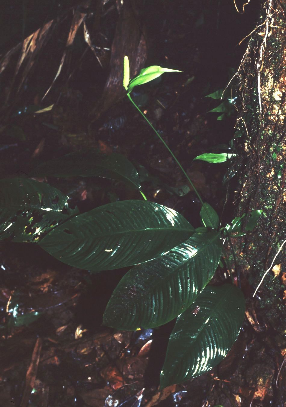 Spathiphyllum silvicola, Aronstabgewächse (Araceae) - Costa Rica: Prov. Puntarenas, PN Piedras Blancas, Bosque Esquinas bei La Gamba